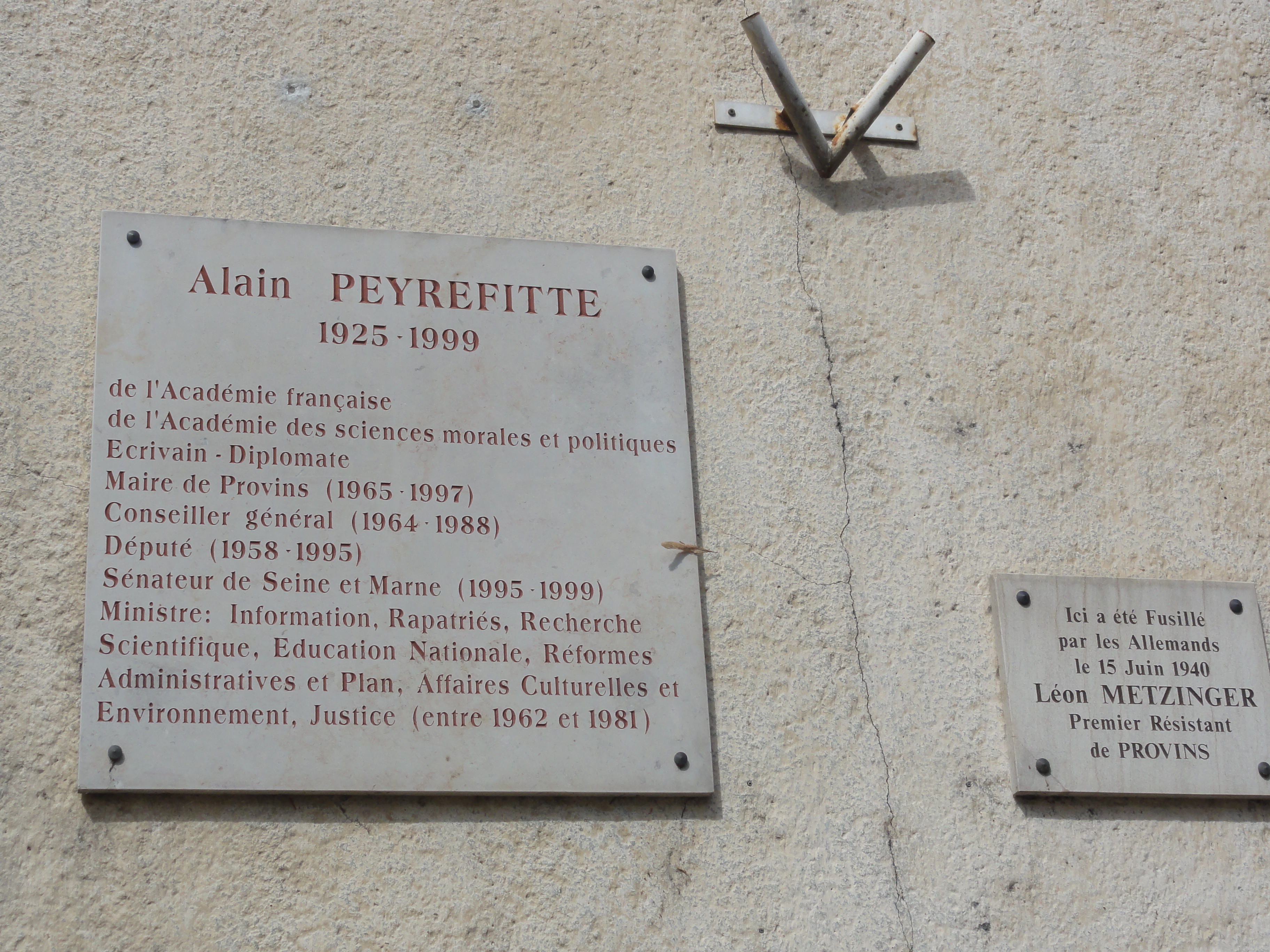 Provins (Seine-et-Marne) plaques maire Alain Peyrefitte et résistant Léon Metzinger